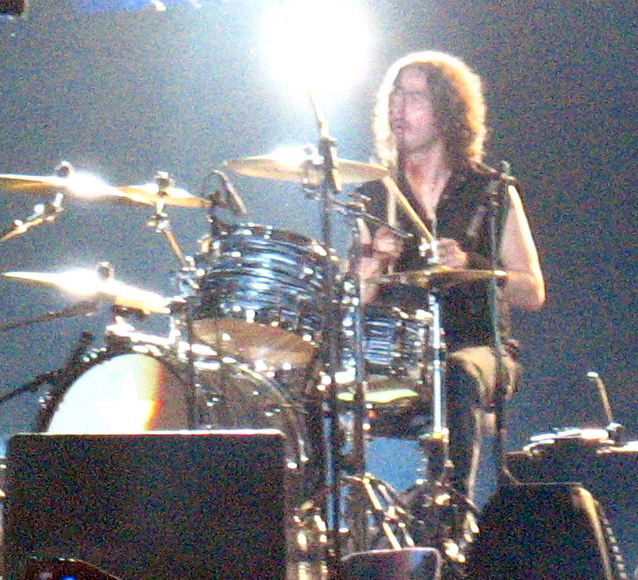 El batería Pedro Andreu, de Héroes del Silencio, durante la gira de 2007